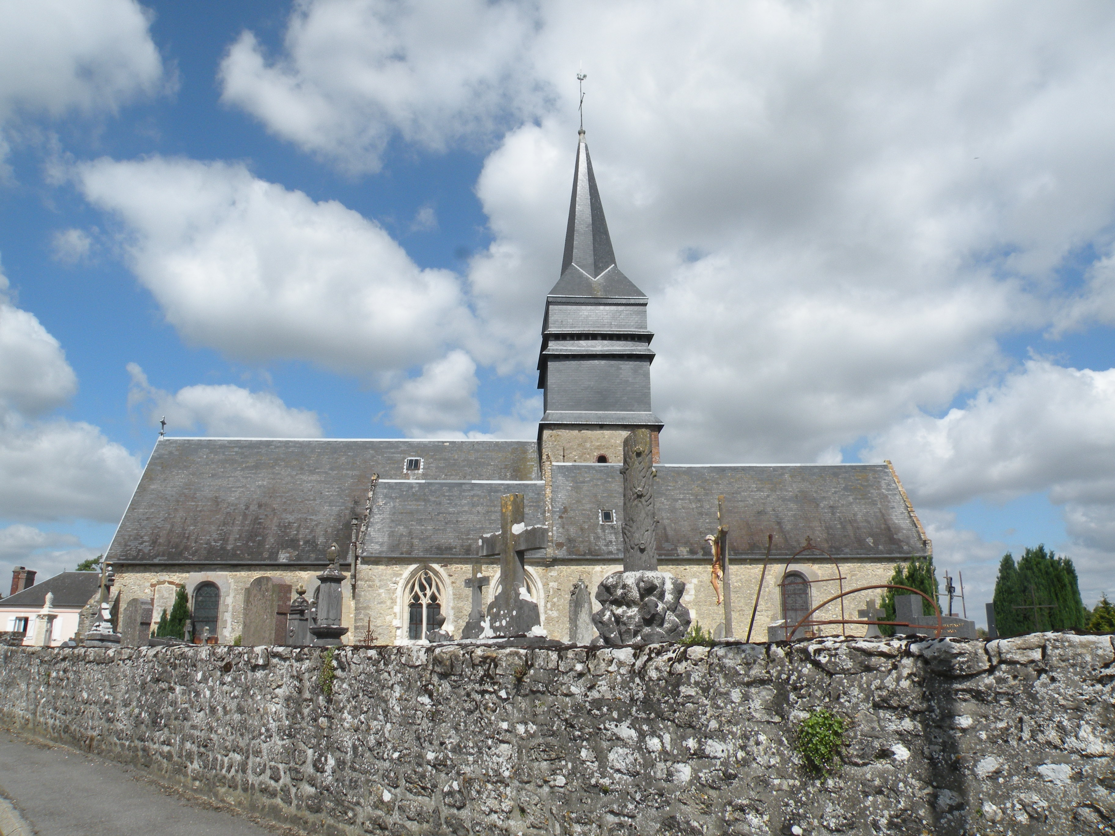 Église Saint-Martin de Senantes (Oise)